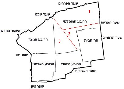 מבנה הרובע המוסלמי